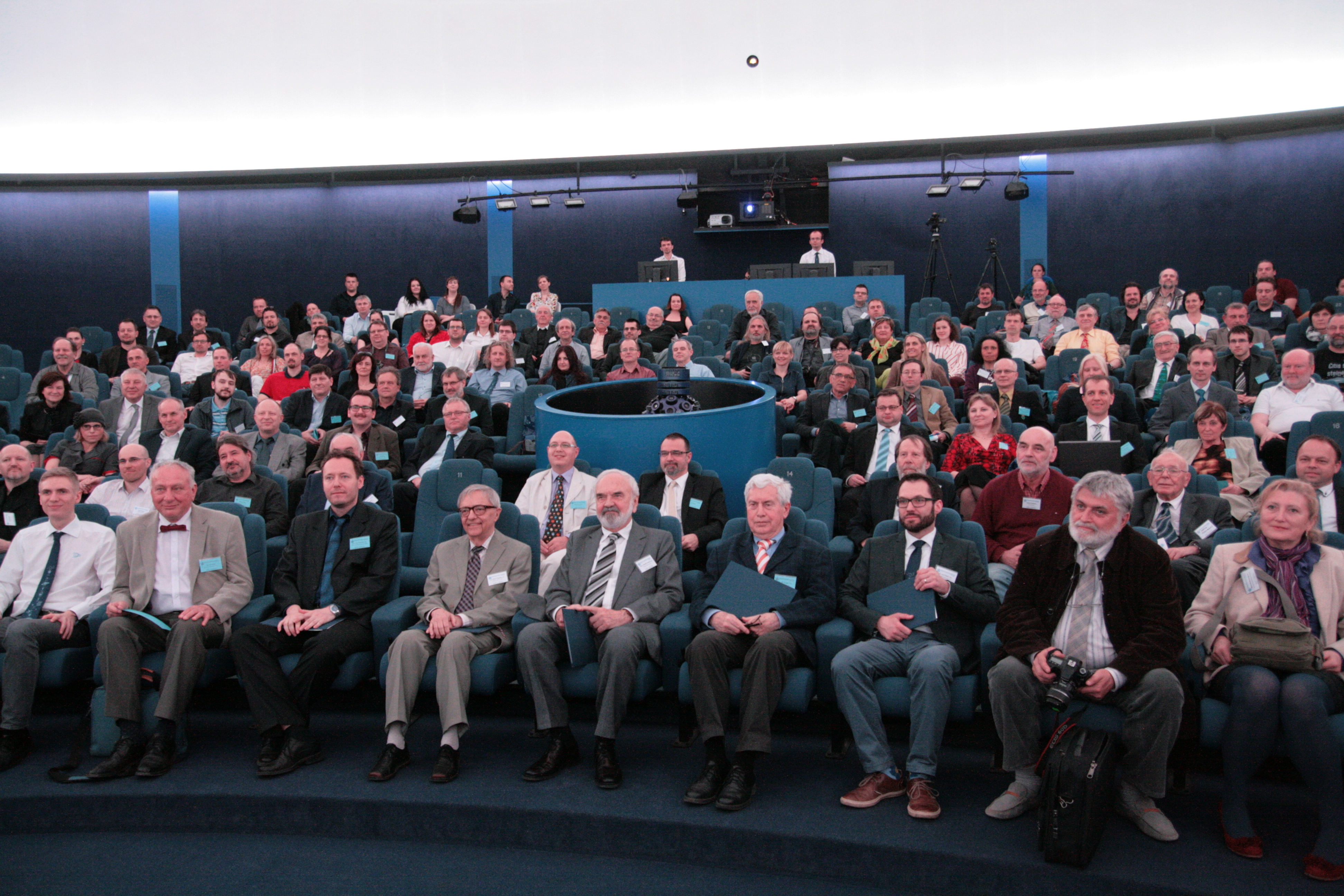 20. sjezd České astronomické společnosti při 100. výročí ve Hvězdárně a planetáriu Brno 1.-2. dubna 2017. Pořízení společné fotografie účastnic a účastníků sjezdu před přijetím Járy Cimrmana za čestného člena společnosti.